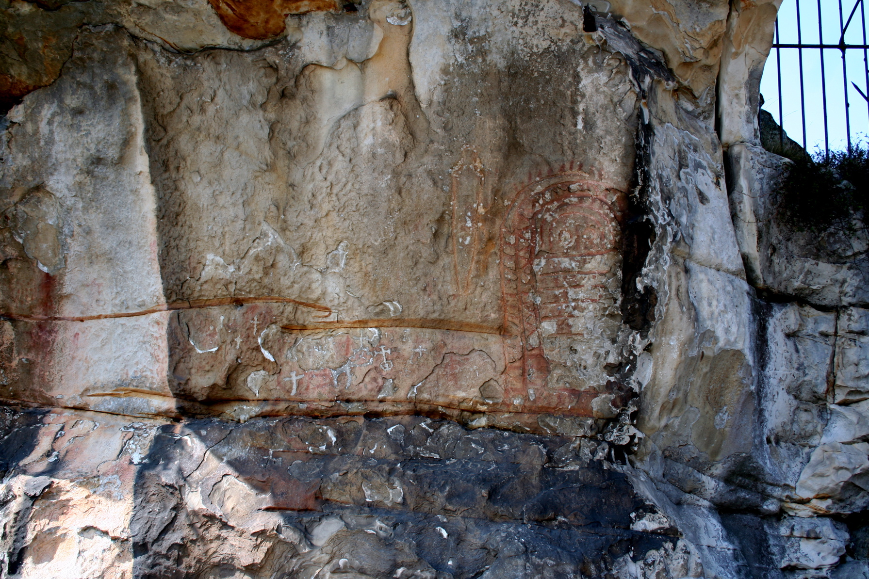 Ídolo de Peña tú y resto de pinturas